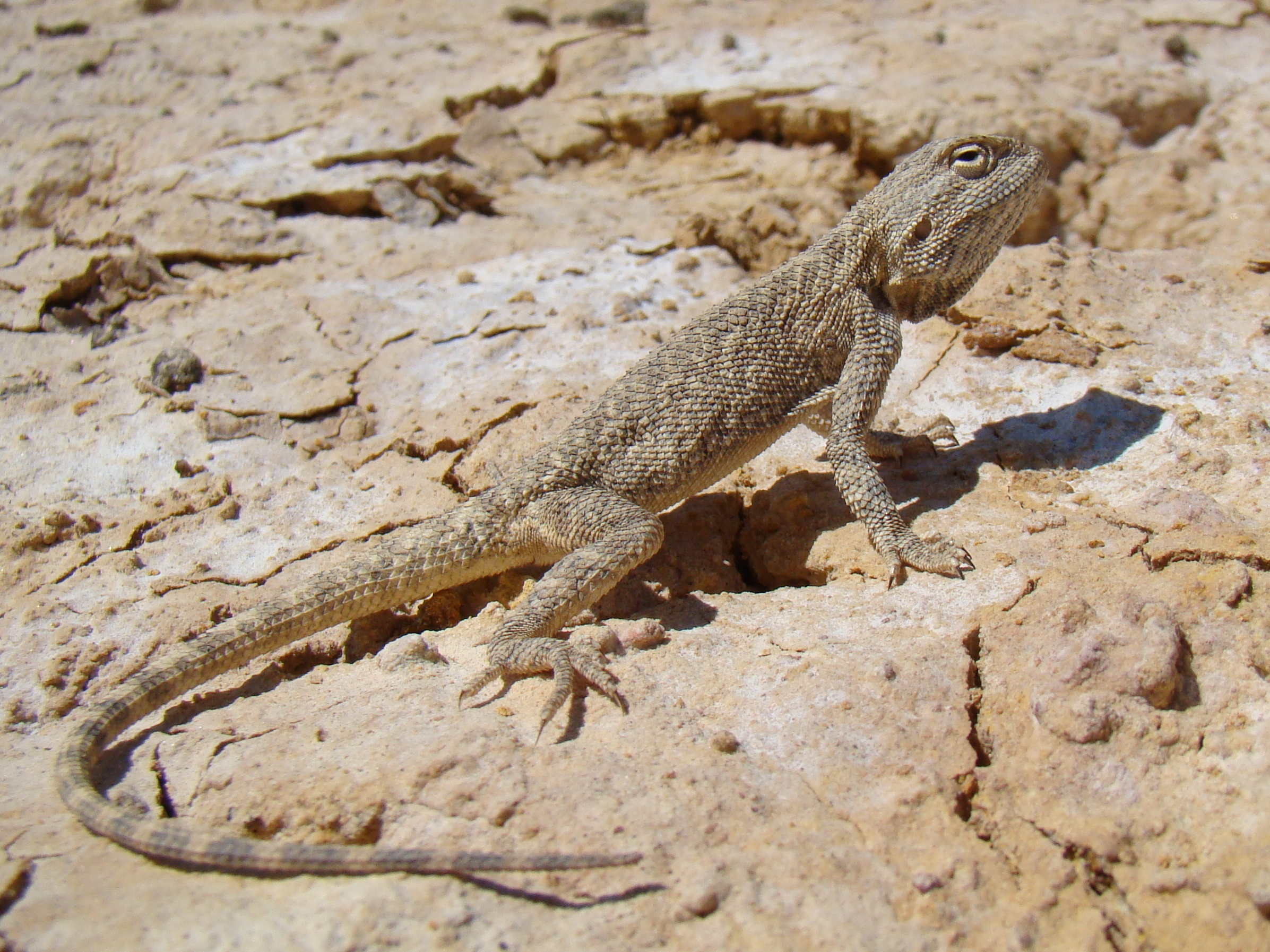 Степная агама (Trapelus sanguinolentus). Молодое животное после зимовки. Окрестности города Байконур, Казахстан.